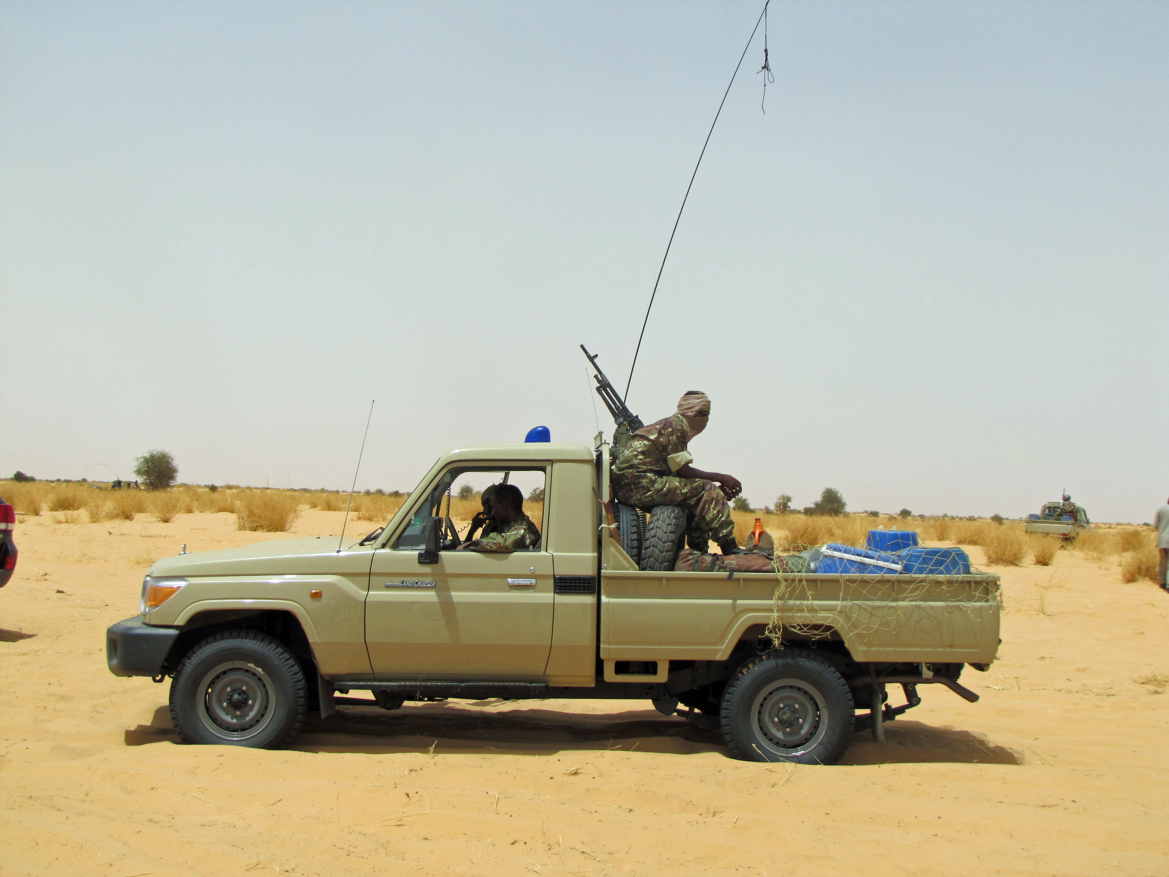 Mauritania has ramped up border security measures to prevent the infiltration of armed groups. موريتانيا تعزز الإجراءات الأمنية على الحدود لمنع تسلل الجماعات المسلحة. La Mauritanie a renforcé ses mesures de sécurité aux frontières pour prévenir l'infiltration de groupes armés.